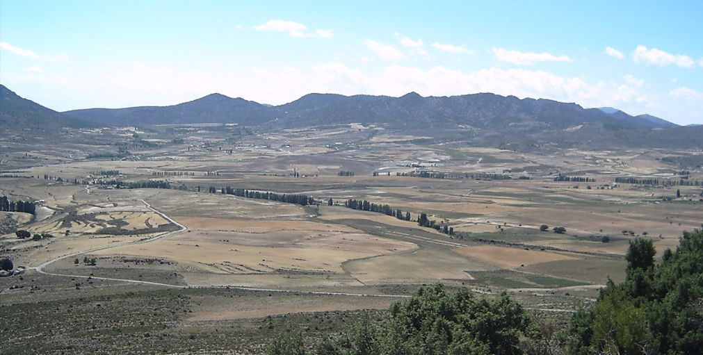 Campo de San Juan, visto desde lo alto de las cuevas de Bajil Campo de san Juan, Moratalla, Murcia, Spain, as seen from Bajil. 2005. Own picture, given to PD.